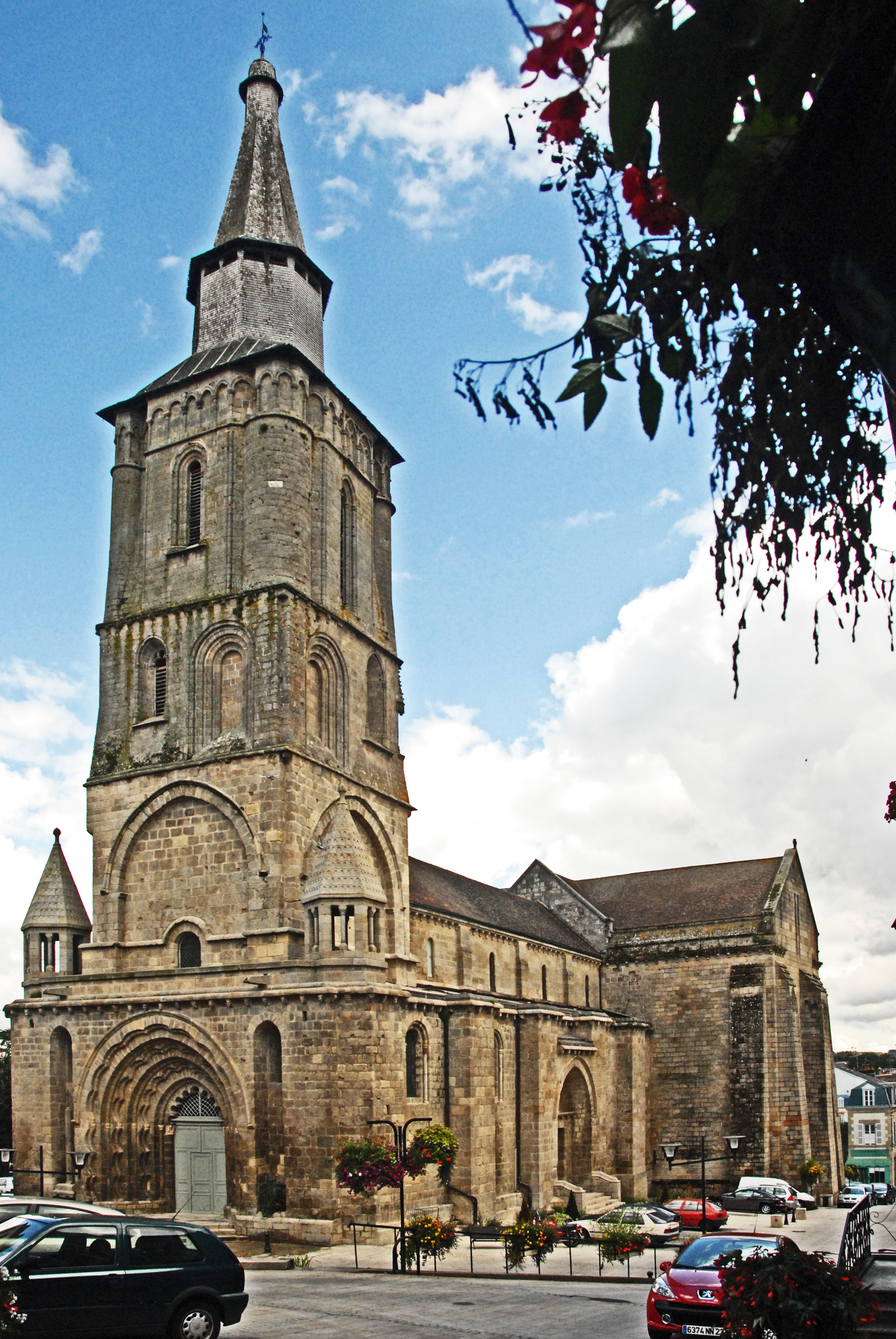 N.-D. de La Souterraine, Westansicht